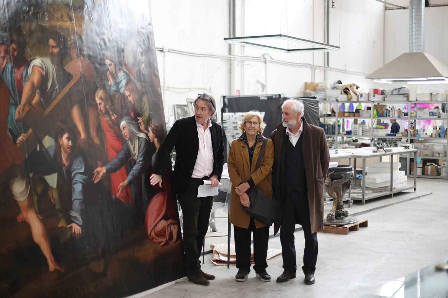 Reproducciones exactas de grandes obras de la historia del arte gracias a la aplicación de las últimas innovaciones tecnológicas. En San Blas-Canillejas hay un centro único en Europa, compartido por la Factum Arte y la Fundación Factum para la Tecnología Digital en Conservación. Son cinco mil metros cuadrados donde trabajan sesenta personas -artistas, técnicos y conservadores dedicados a la mediación digital-, como ha comprobado esta mañana la alcaldesa de Madrid, Manuela Carmena, en la visita que ha realizado con el coordinador general de Alcaldía, Luis Cueto y el fundador del centro, el pintor Adam Lowe.